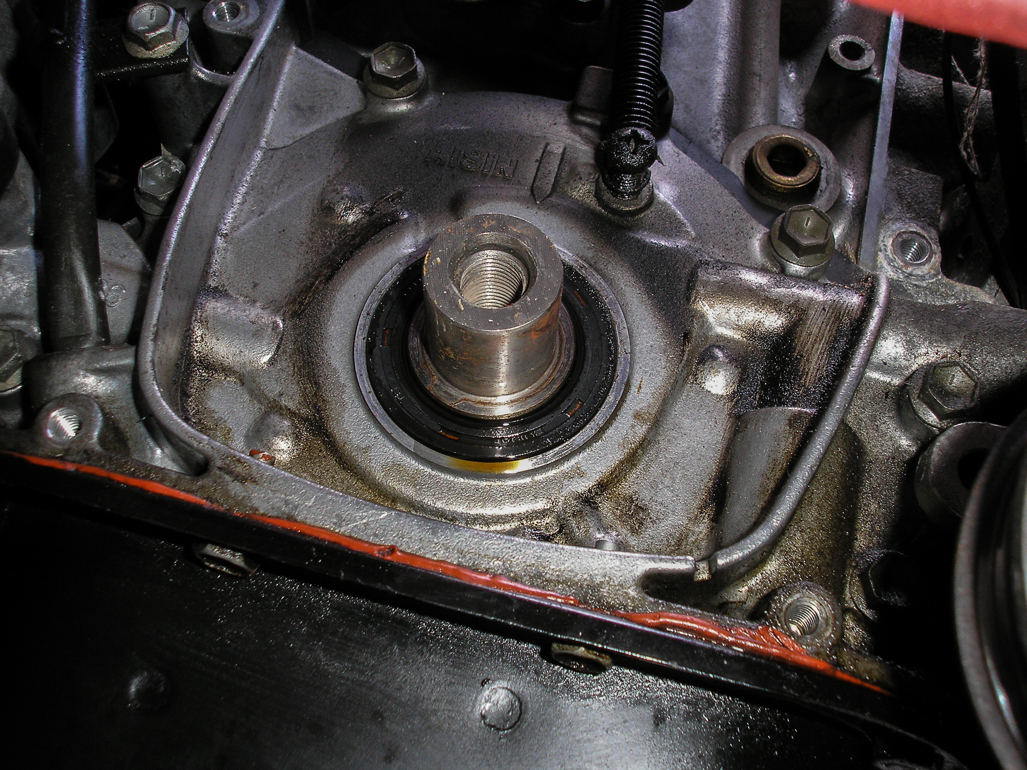 Verschlissener Radialwellendichtring der Kurbelwelle eines Dreizylinder-Ottomotors (Suzuki G10A, Zahnriemenseite).